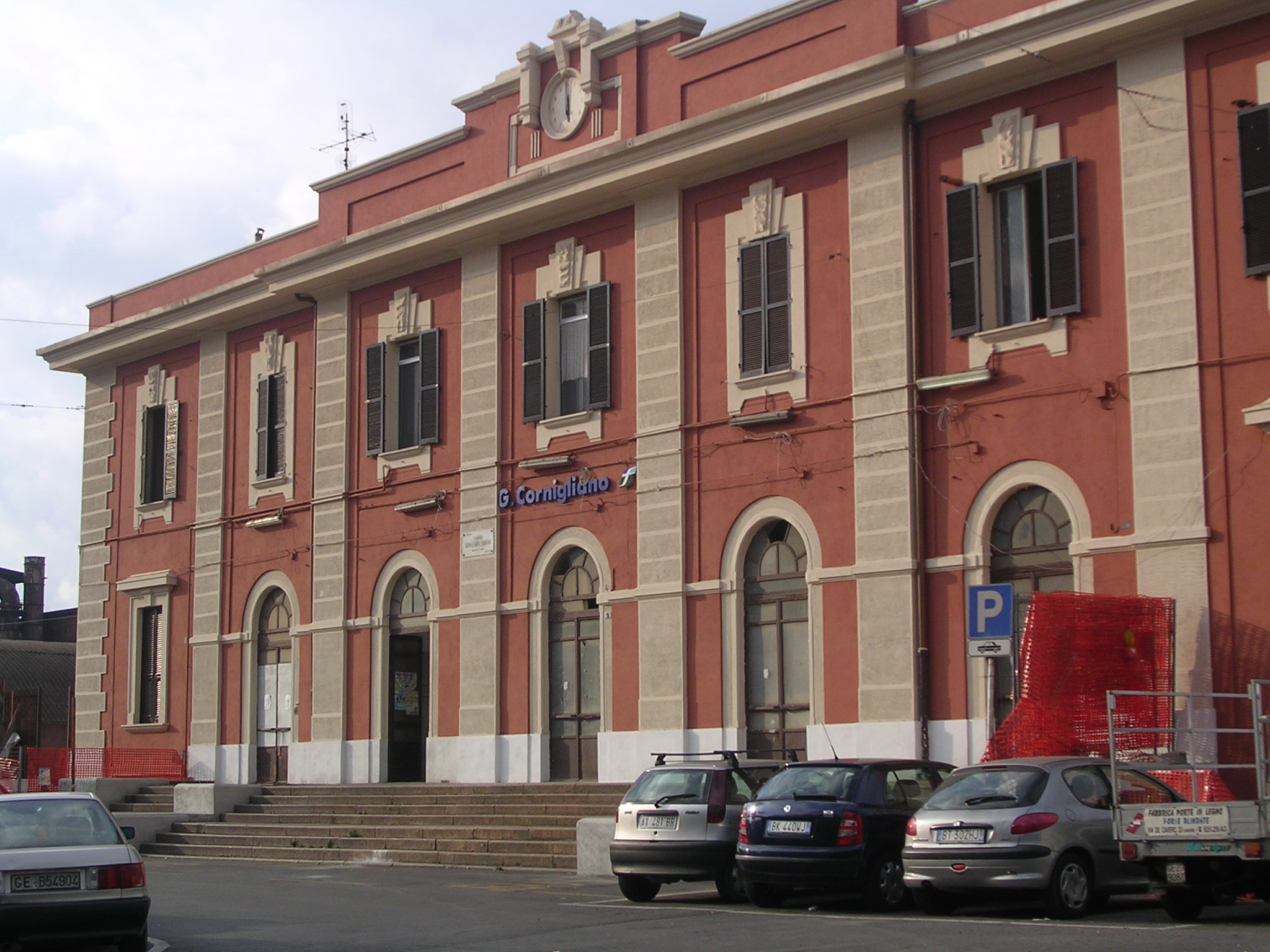 Fabbricato viaggiatori della stazione di Genova Cornigliano appena terminati i lavori esterni di restauro